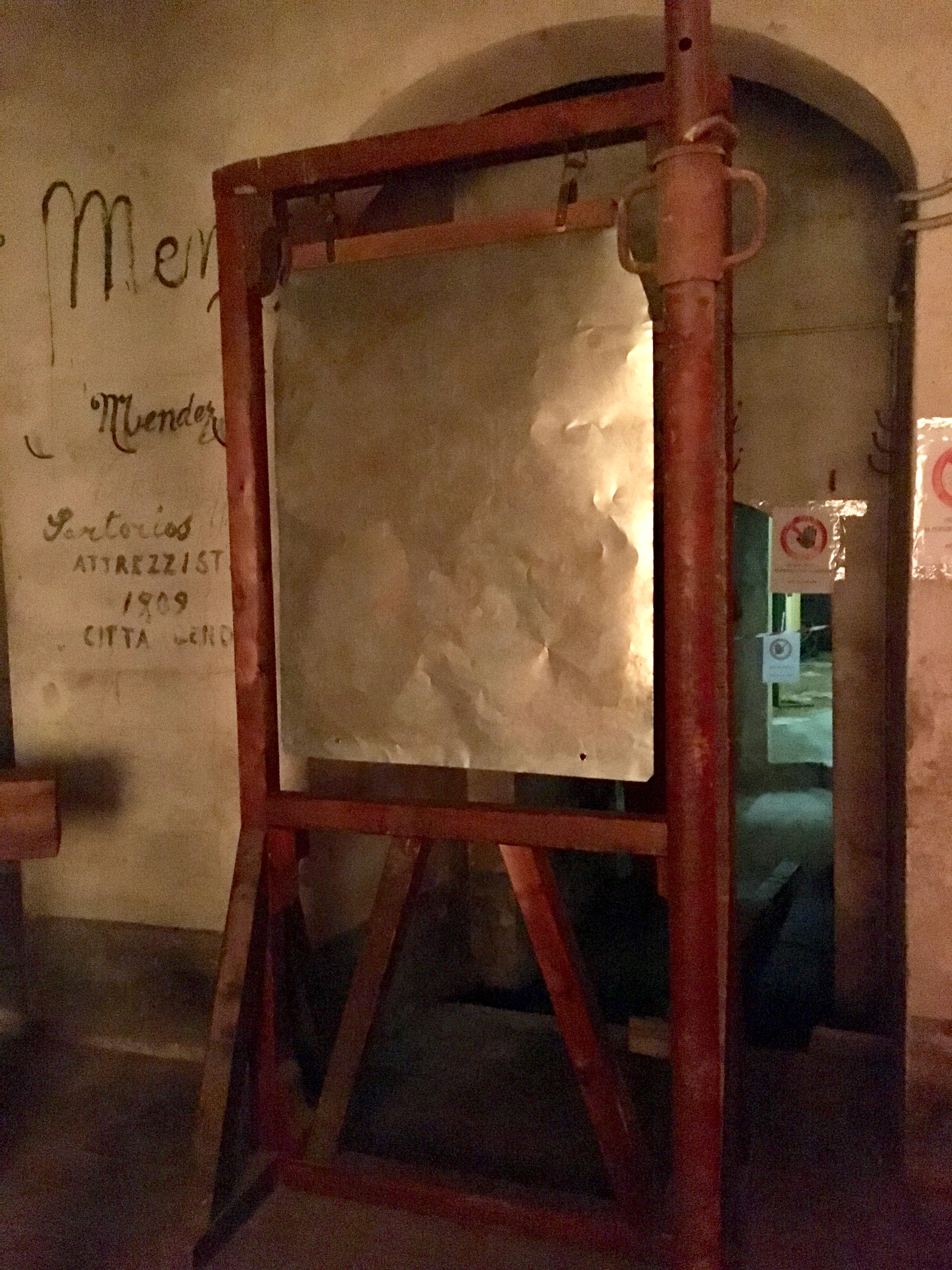 Macchina del tuono, teatro della Pergola di Firenze